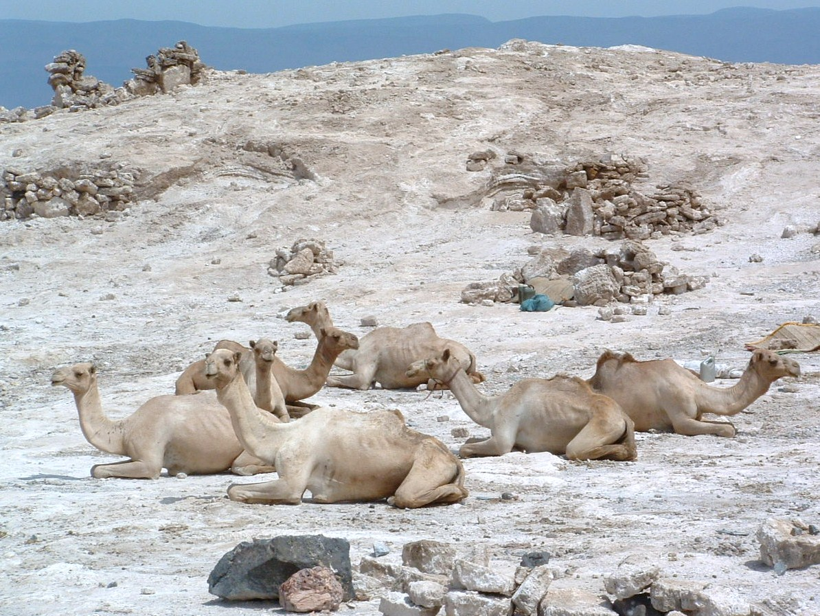 Dromadaires utilisés par les caravaniers du sel du lac Assal.